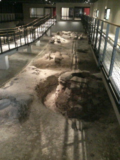 長崎市内の発掘調査で確認された聖ドミニコ教会跡の遺構 現在は保存処理され資料館となっている